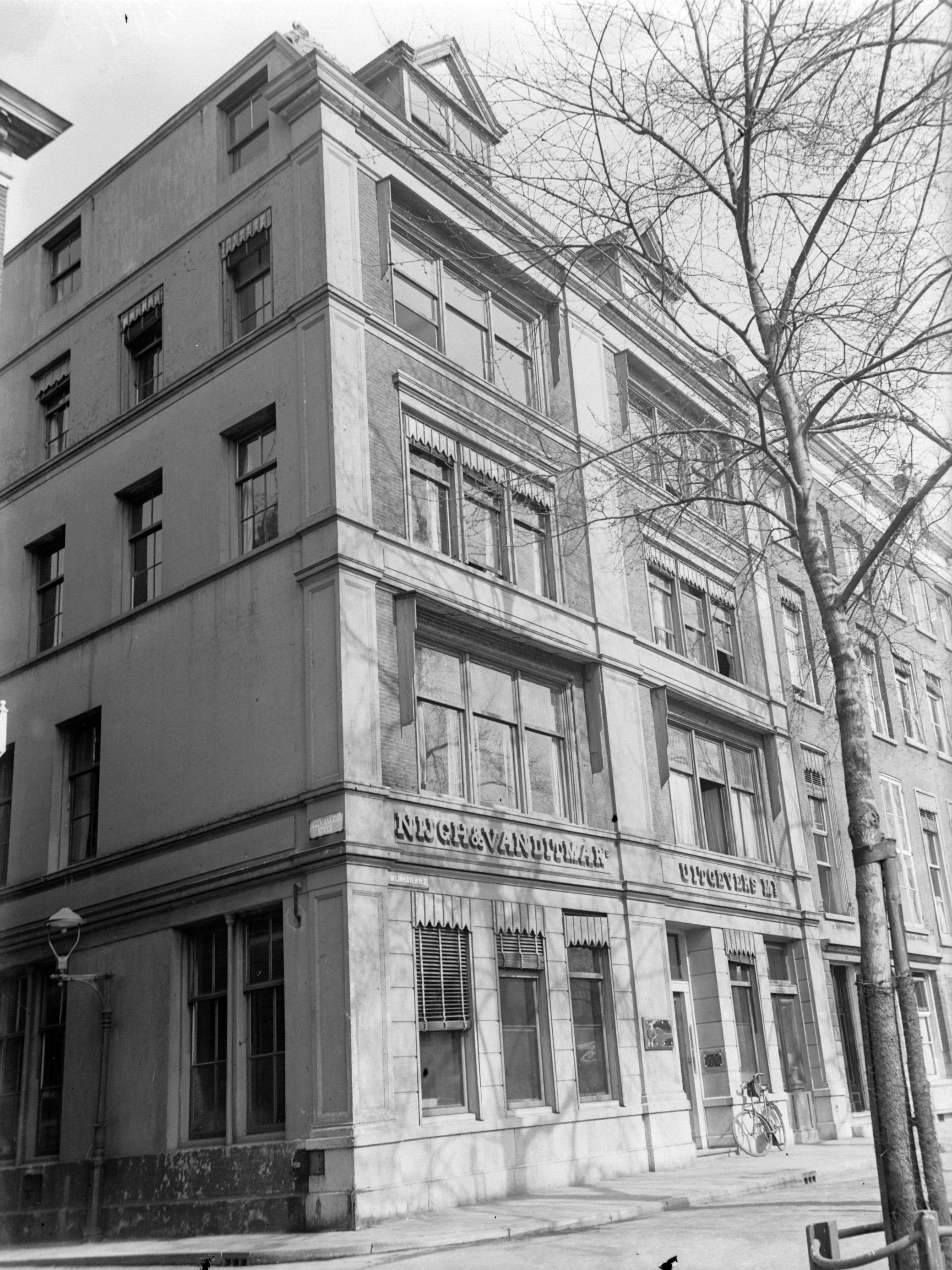 Collectie / Archief : Fotocollectie Van de Poll Reportage / Serie : Reportage Nijgh en Van Ditmar Beschrijving : Het pand van Uitgeverij Nijgh en Van Ditmar aan de Wijnhaven te Rotterdam Datum : 1933 Locatie : Rotterdam, Zuid-Holland Trefwoorden : exterieur, gebouwen Fotograaf : Poll, Willem van de, [onbekend] Auteursrechthebbende : Nationaal Archief Materiaalsoort : Glasnegatief Nummer archiefinventaris : bekijk toegang 2.24.14.02 Bestanddeelnummer : 189-0322